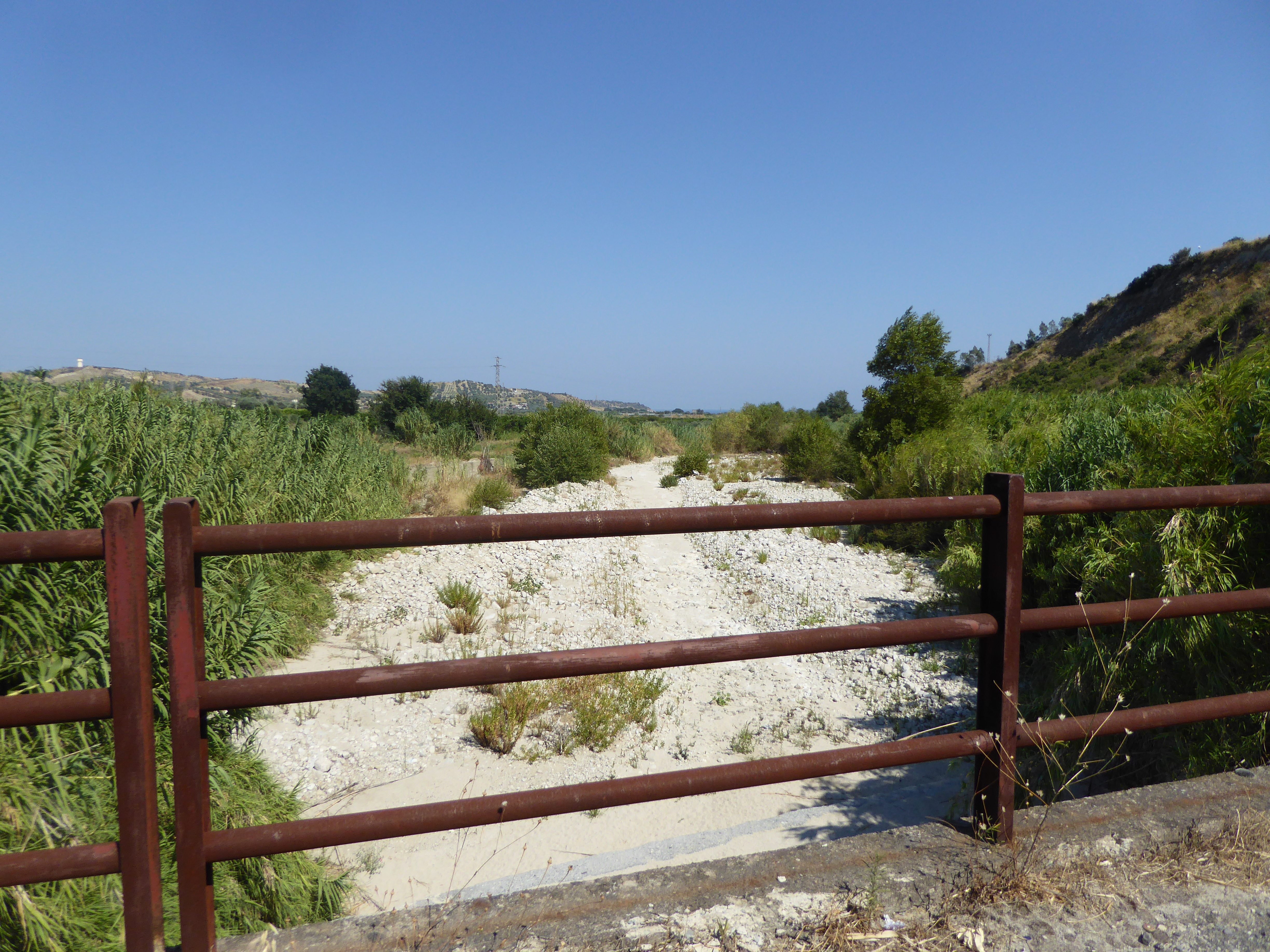 Foto del Fosso Brunìa scattata dal ponte verso il mar Jonio (Stilo Agosto 2019)